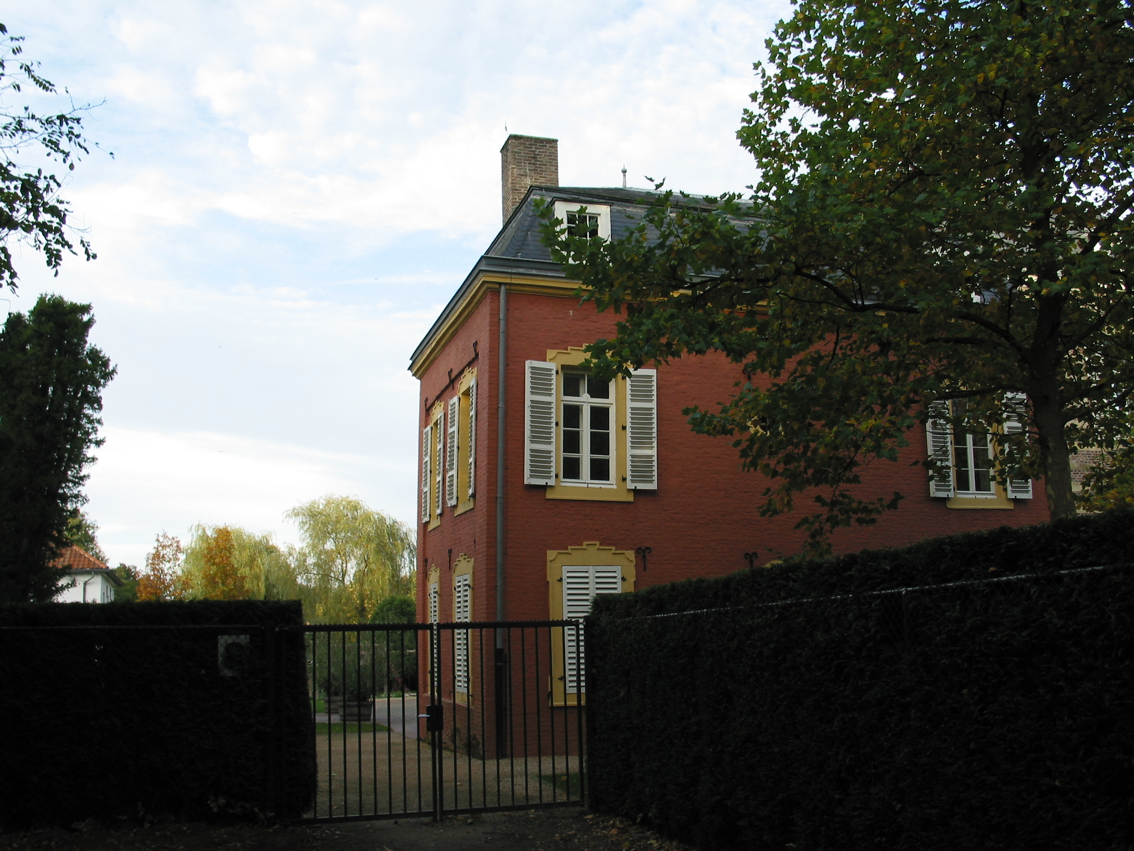 Weitere Teile des Schlosses.